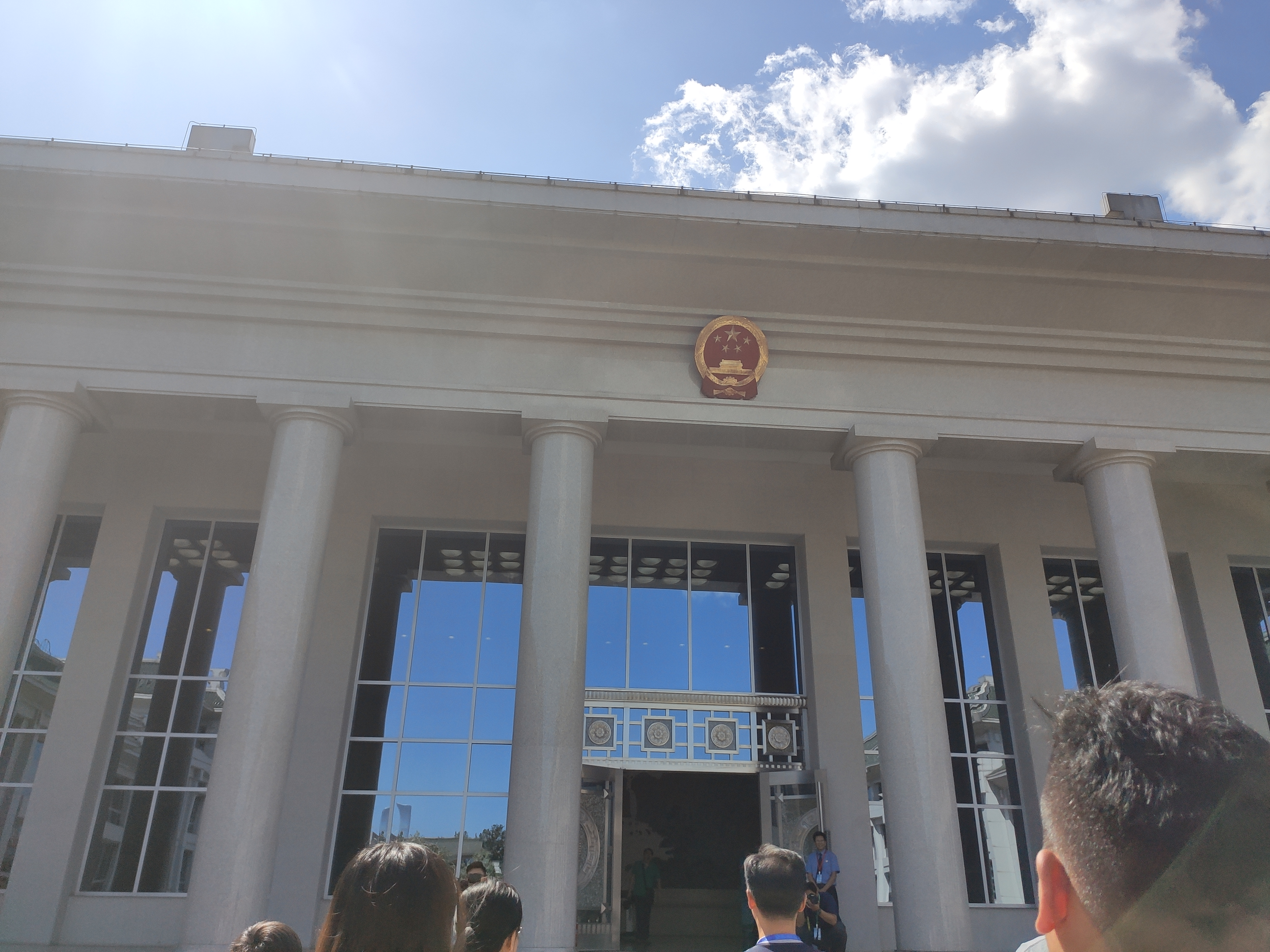 最高人民检察院